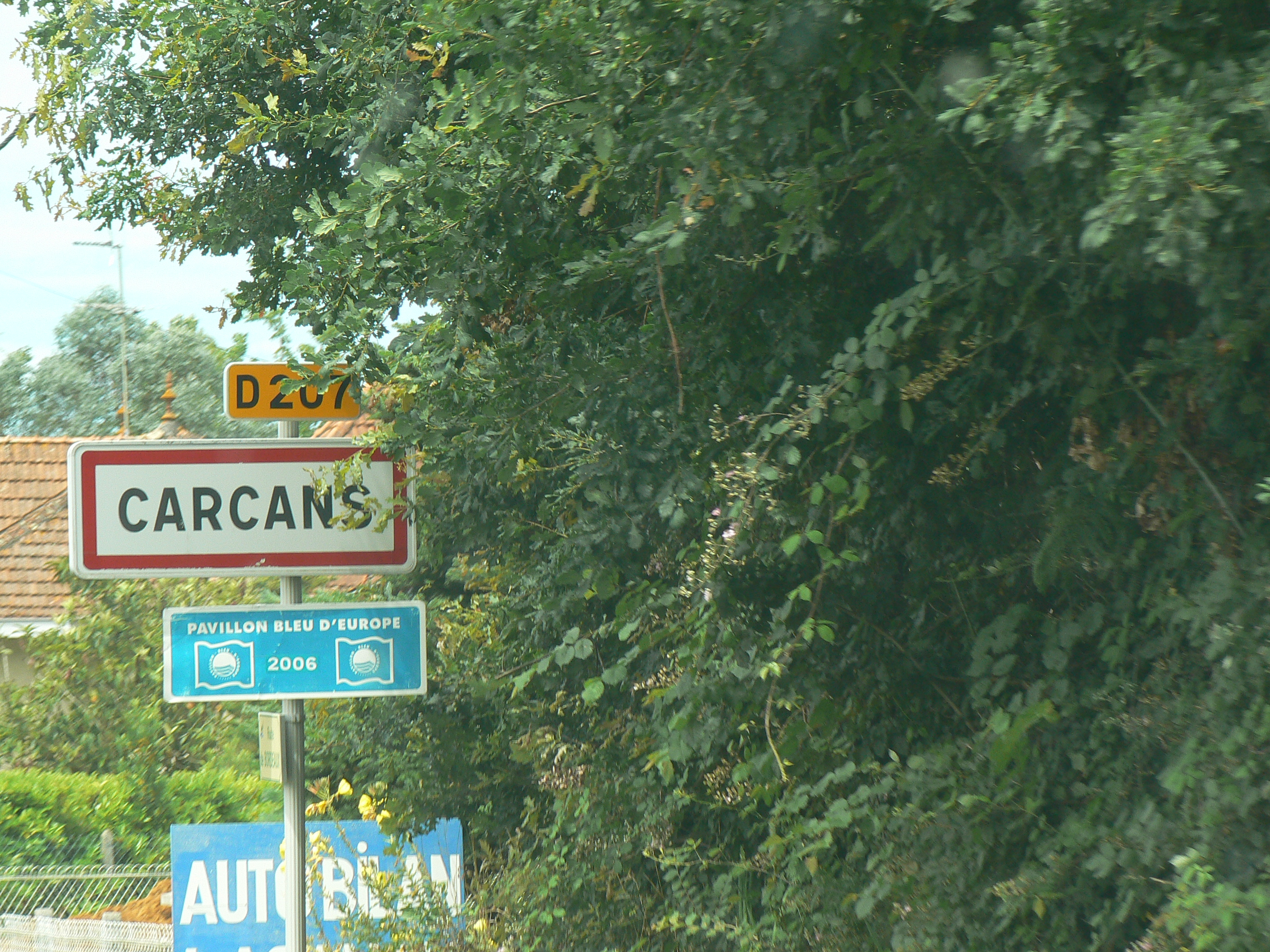 Panneau a l'entrée de Carcans - (180 mm \ F5.6 \ 1/160 s) - Photo David Néel